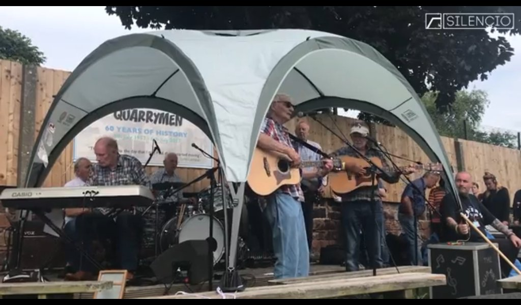 The Quarrymen actuando en St. Peters Church, Woolton, Liverpool, el 06-JUL-2017, en el mismo lugar (el jardín posterior de la iglesia) en el que la banda tocó liderada por John Lennon el 06-JUL-1957, cuando John Lennon se encontró con Paul McCartney.